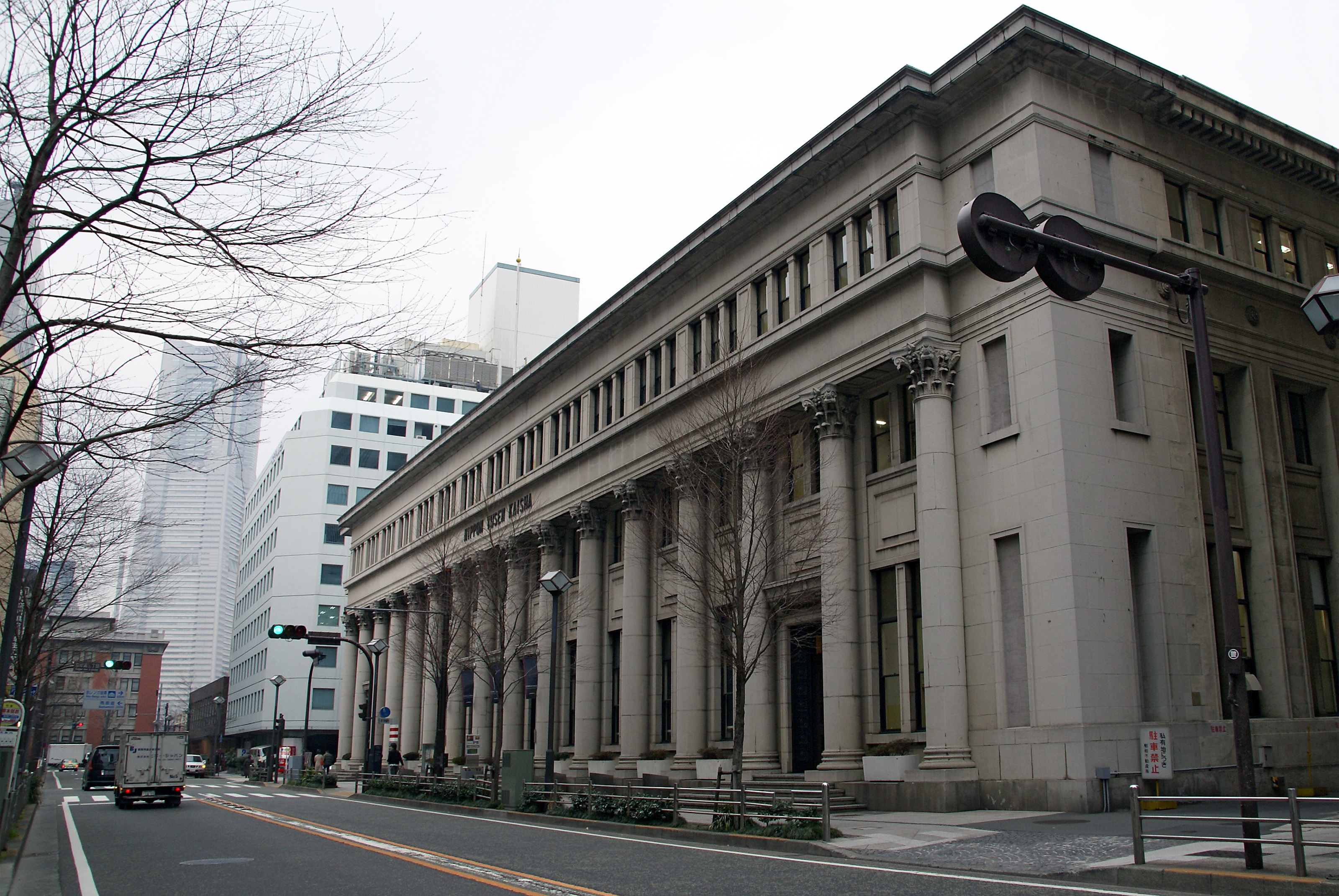 NYK Maritime Museum in Yokohama, Kanagawa, Japan